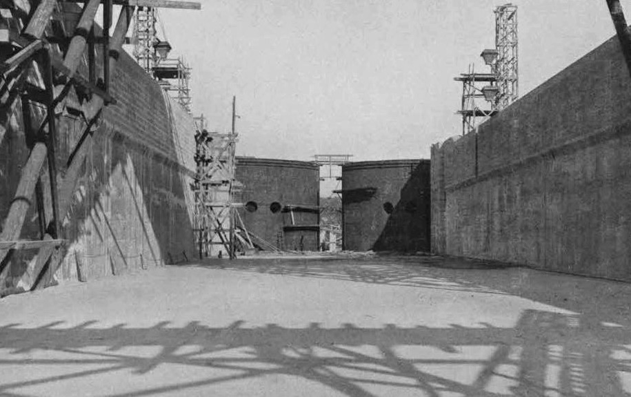 Hammarbyslussen utan vatten 1923